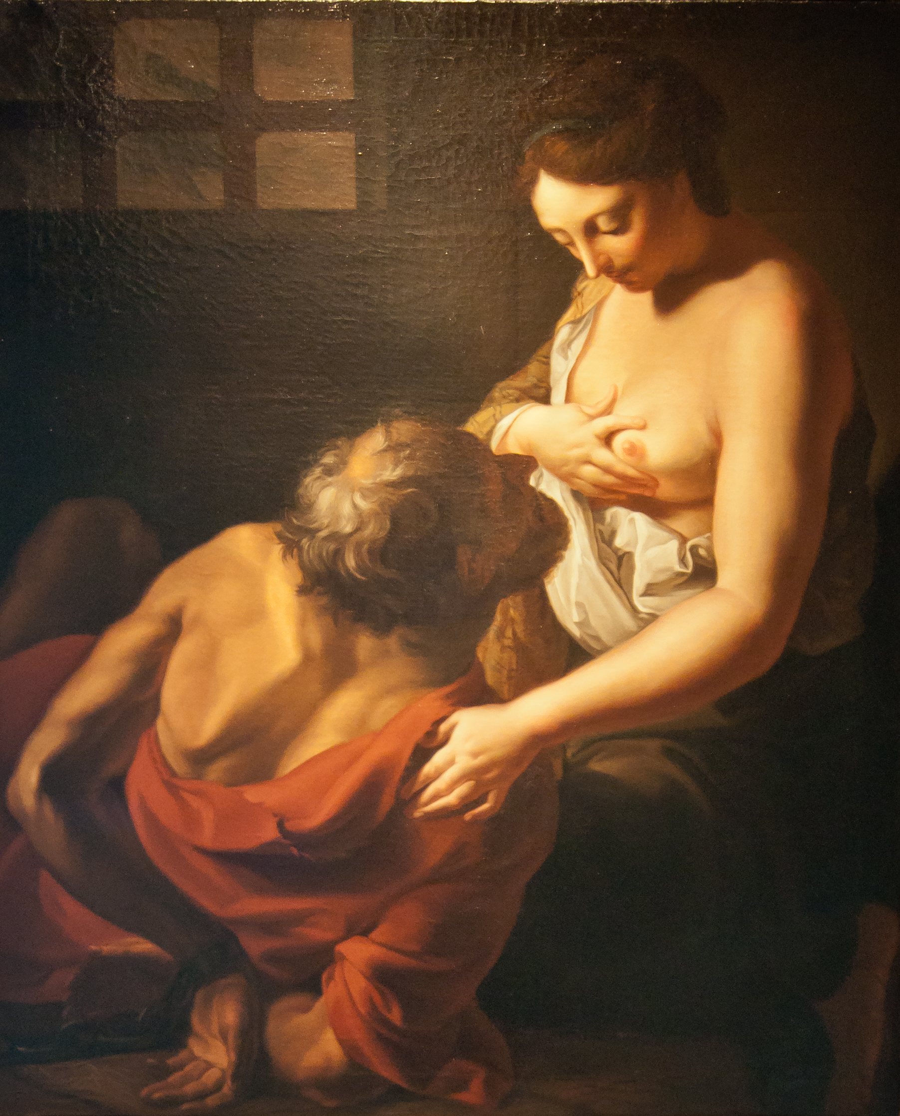 La Charité